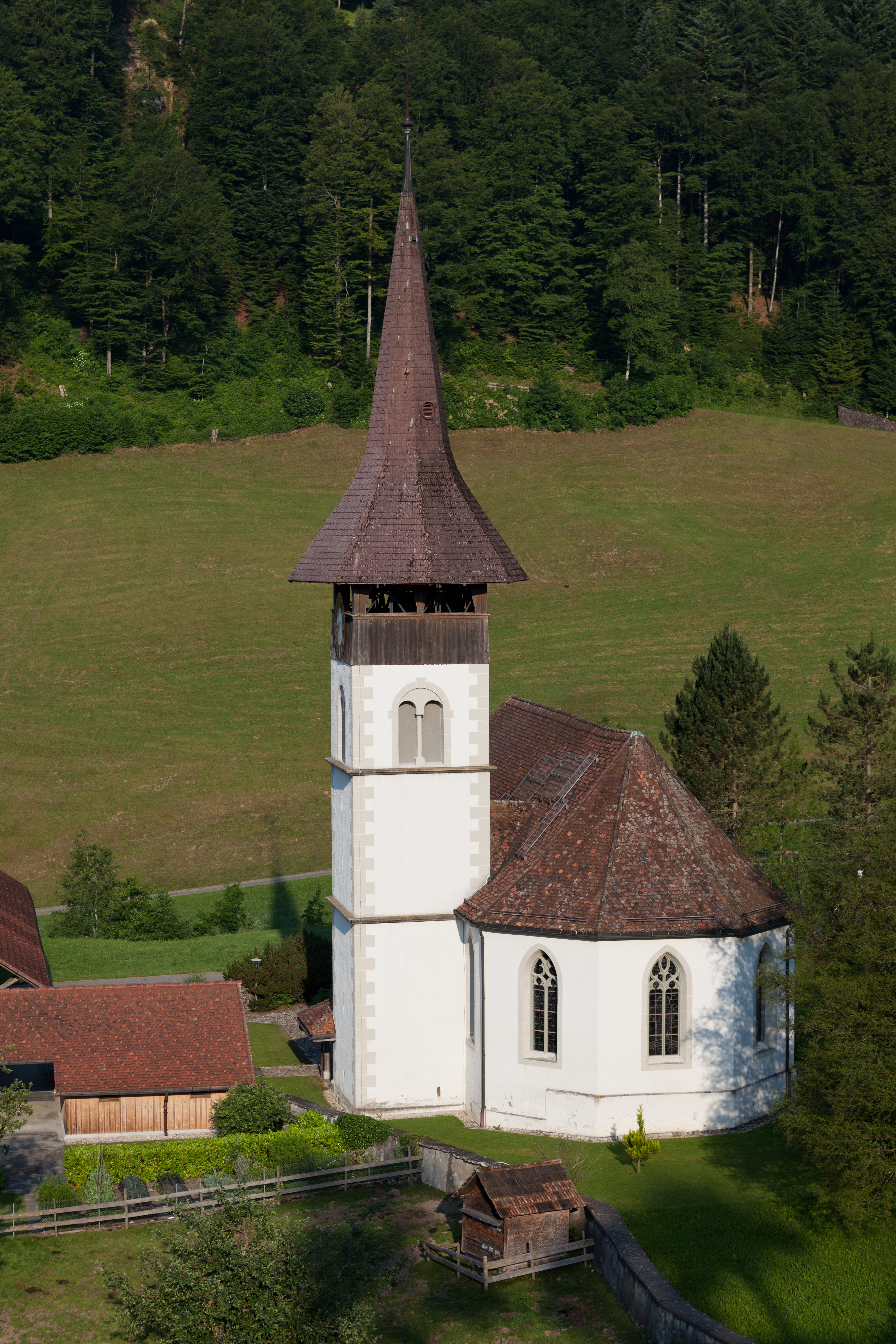 Reformierte Kirche in Trub (BE)